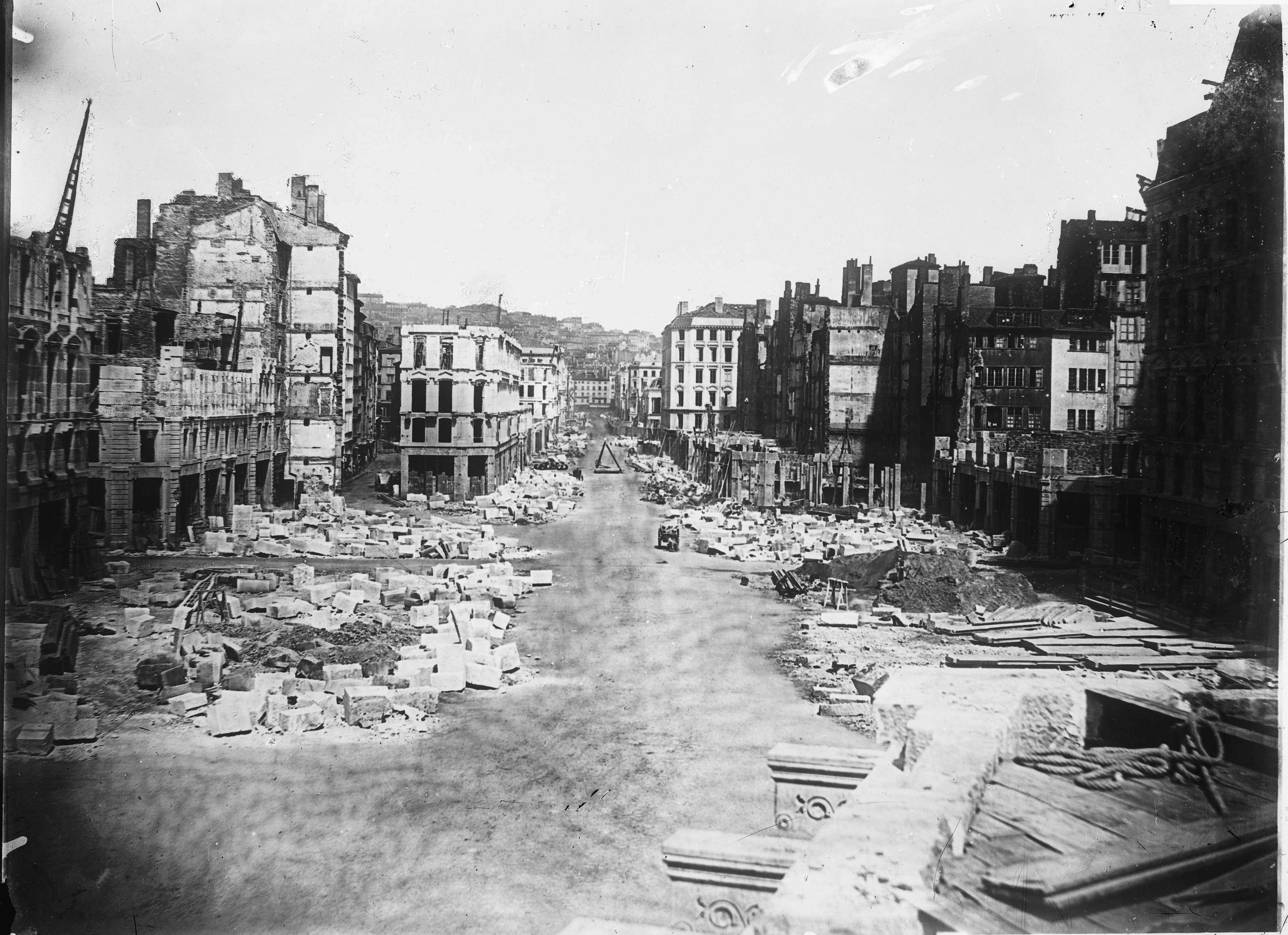 Grands travaux d'urbanisme du Second Empire ; ouverture de la rue Impériale